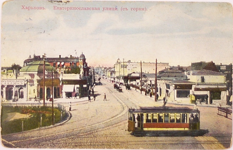 Ekatirinoslavskaya Street in Kharkov. Вид с Университетской горки через Сергиевскую площадь и Лопанский мост на начало Екатеринославской улицы.